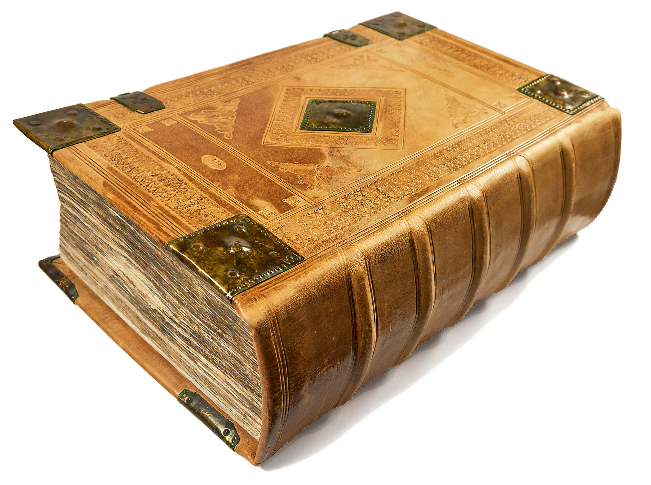 Froschauer Bibel von 1580 Gutenberg Museum Place de Notre Dame 14 1700 Fribourg Switzerland